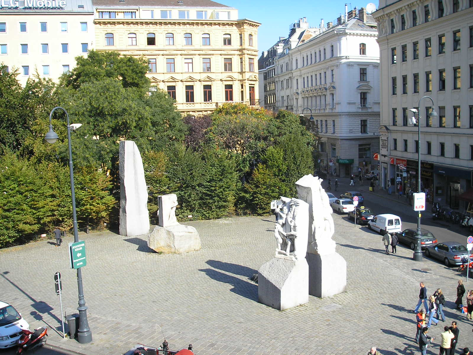 Mahnmal gegen Krieg und Faschismus (Monument against War and Fascism) in Vienna, Austria. Constructed by Alfred Hrdlicka.